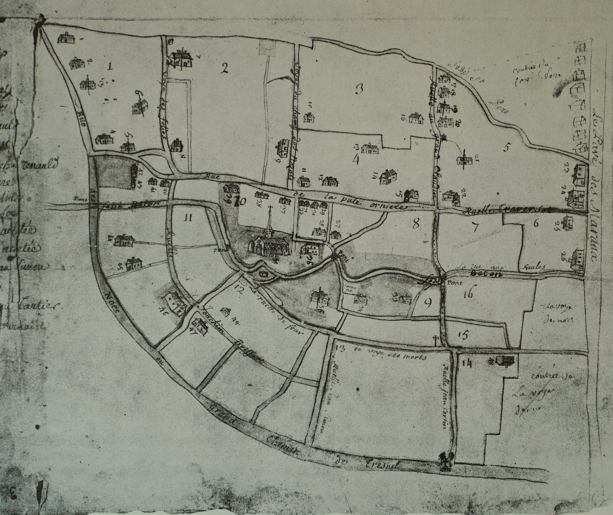 dessin issu des archives de l'aube.